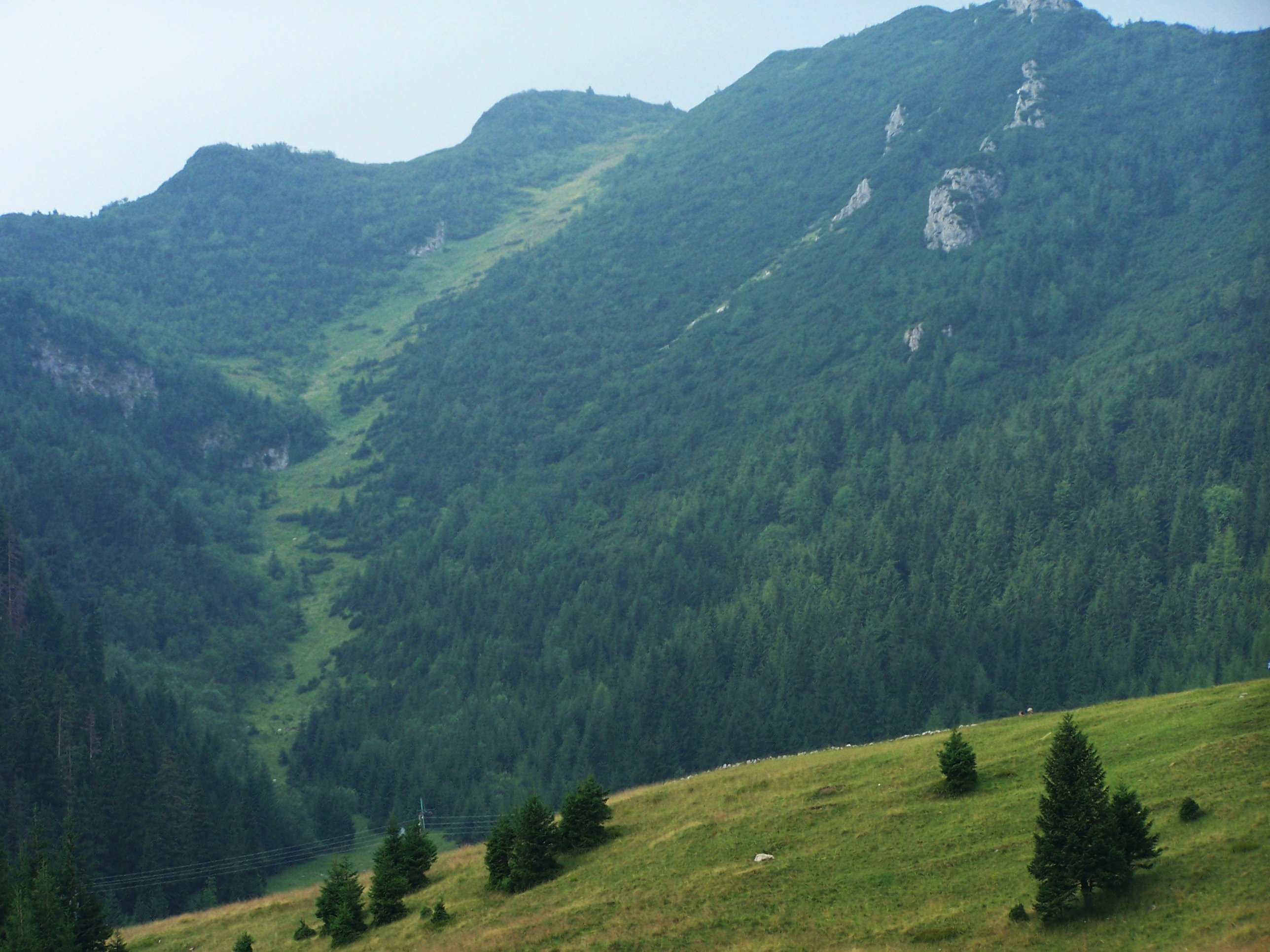 Kalackie Koryto - widok z polany Kalatówki